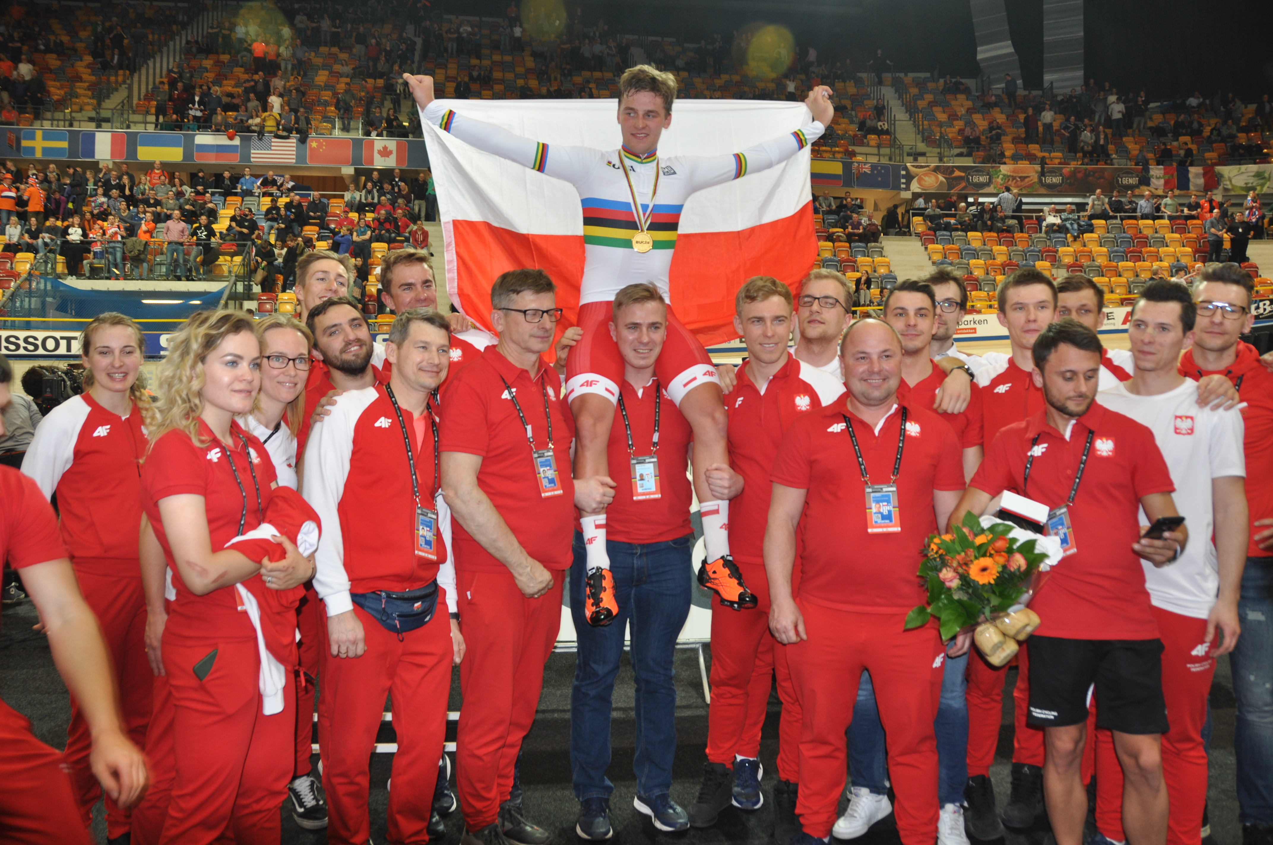 Szymon Sajnok, polnischer Radsportler - Weltmeister im Omnium